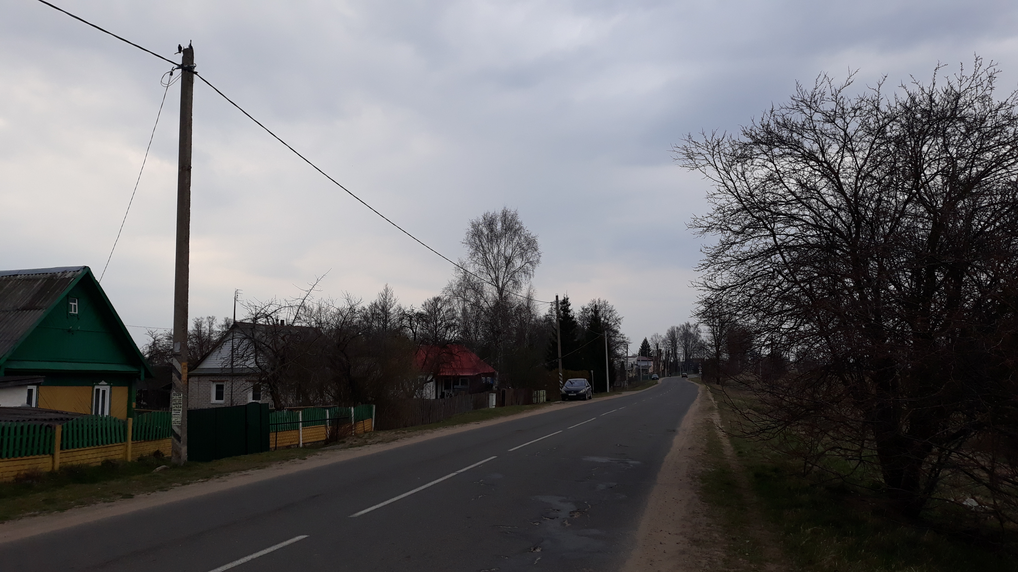 Краявіды